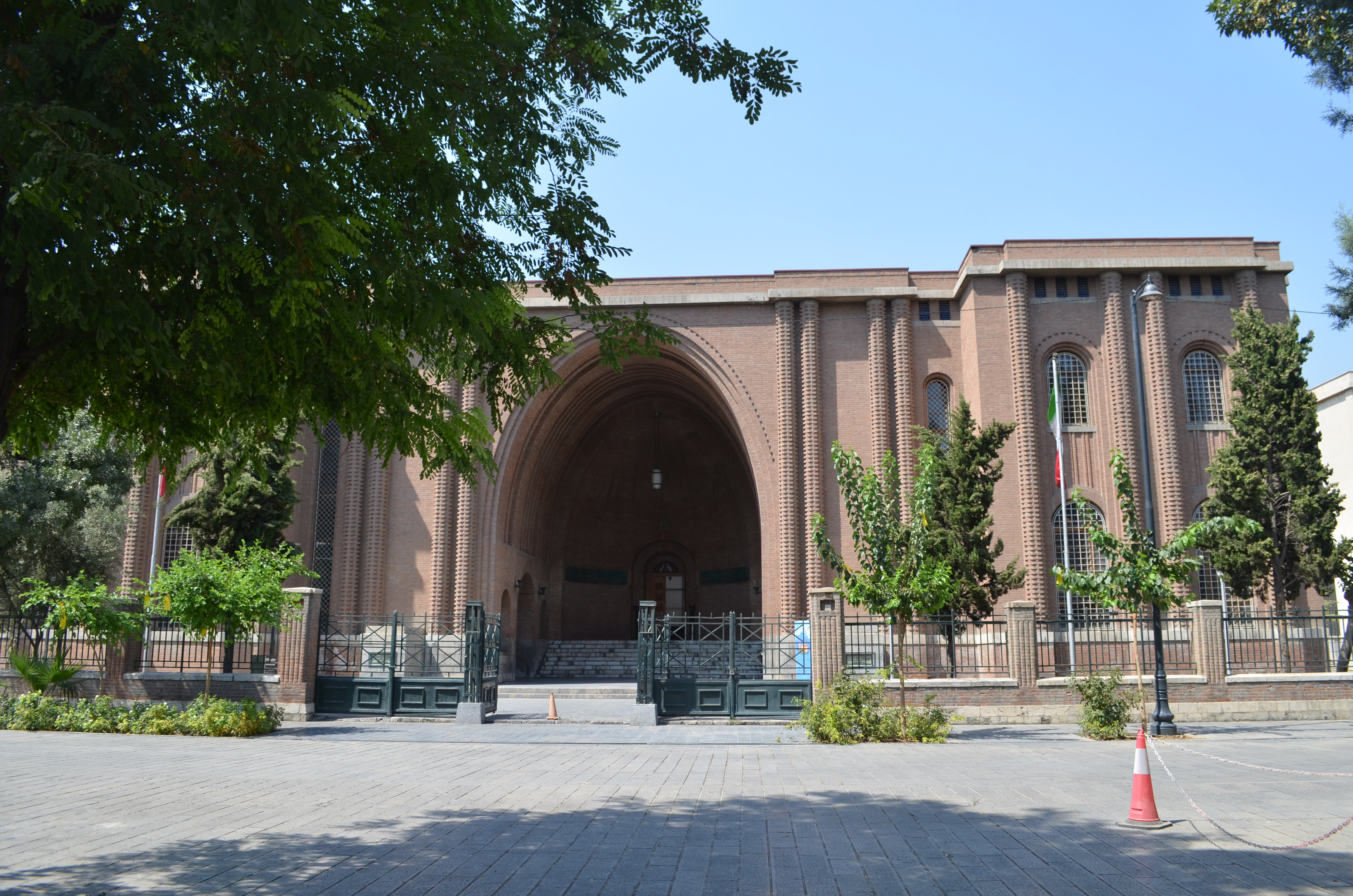 موزهٔ ایران باستان